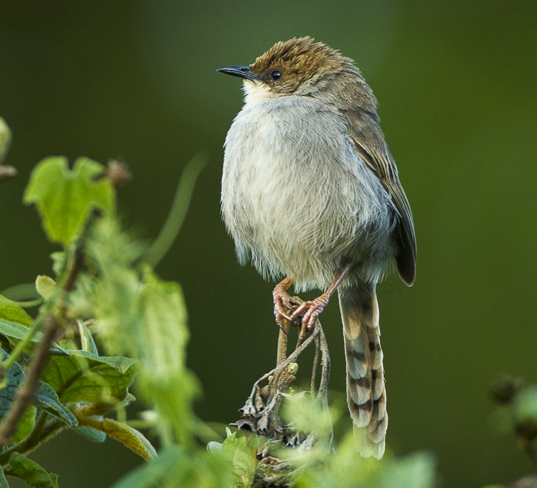 Hunter's Cisticola - Kenya_S4E7660